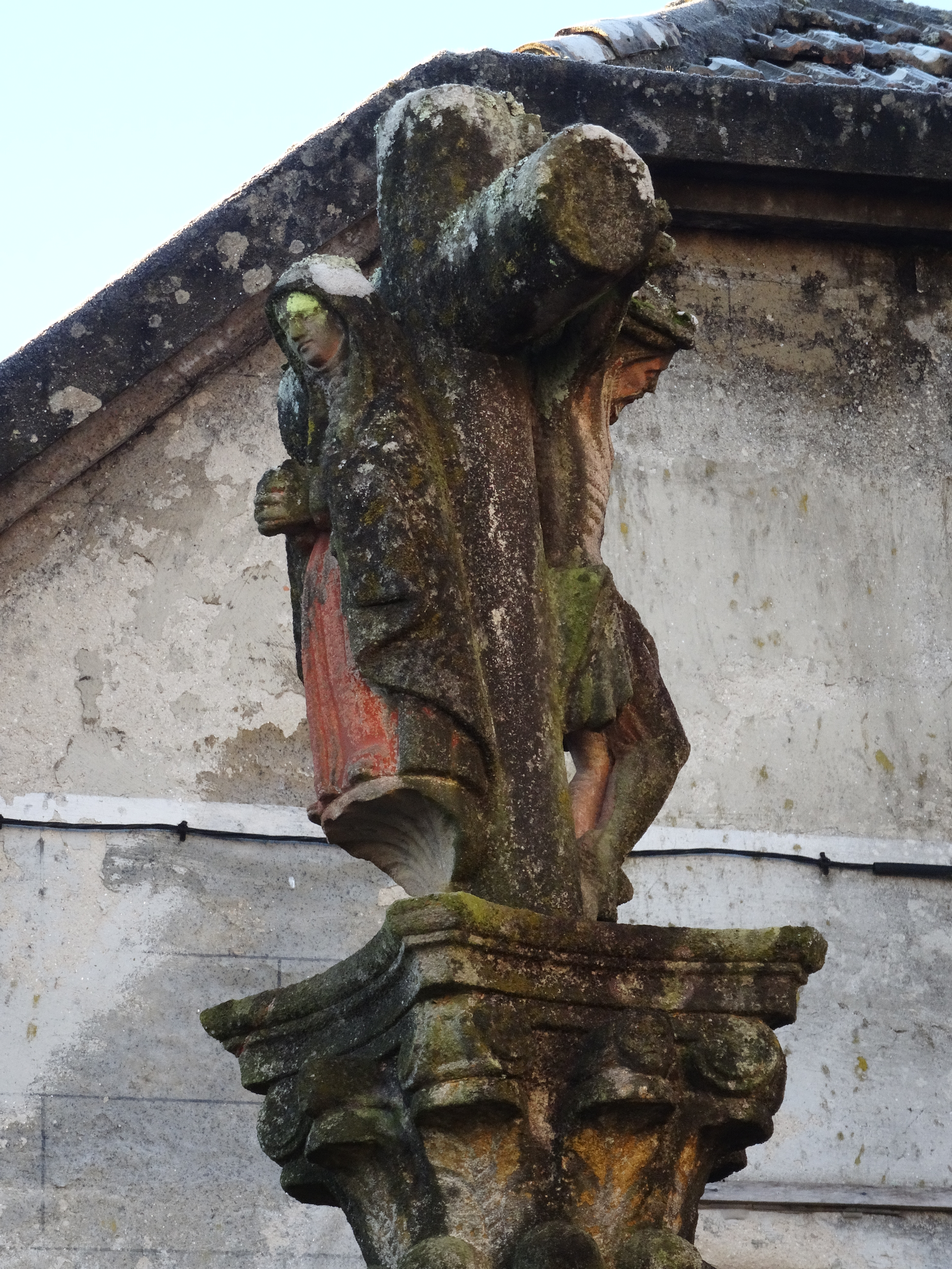 Ver título.